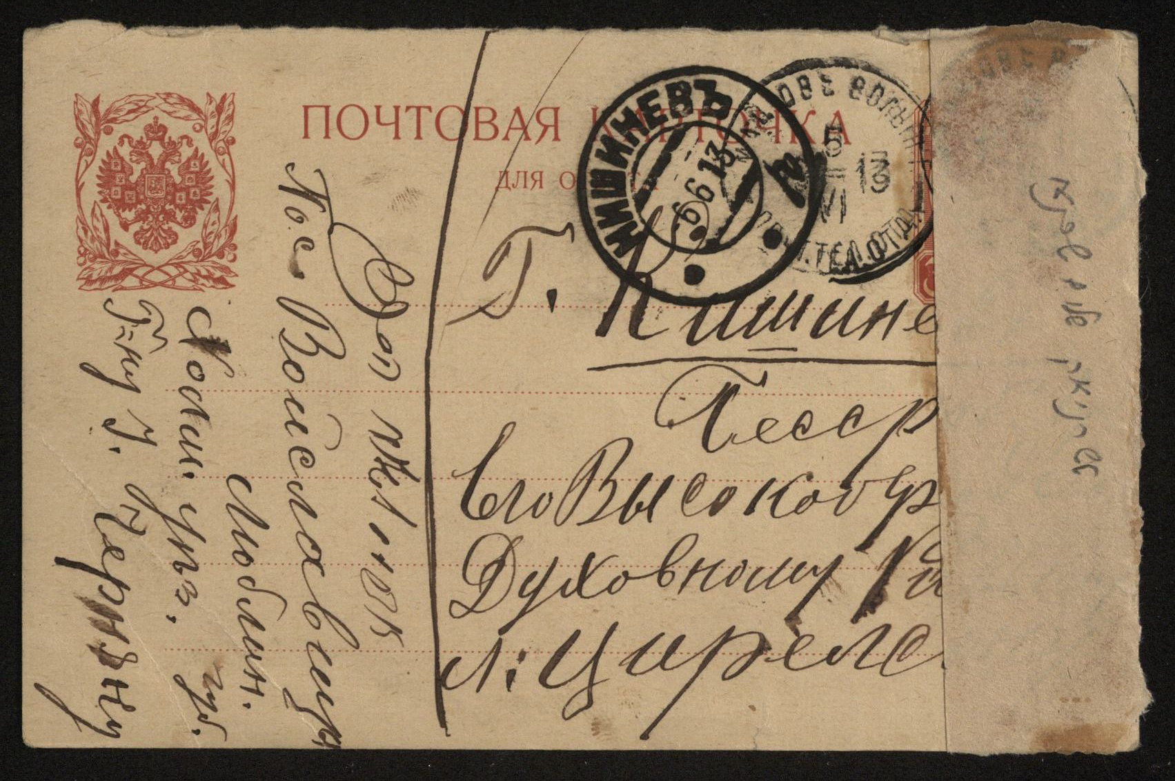 גלוית הרב צ'רניאק לרב יהודה לייב צירלסון מקישינב, 6.6.1913, צד ב', הספרייה הלאומית